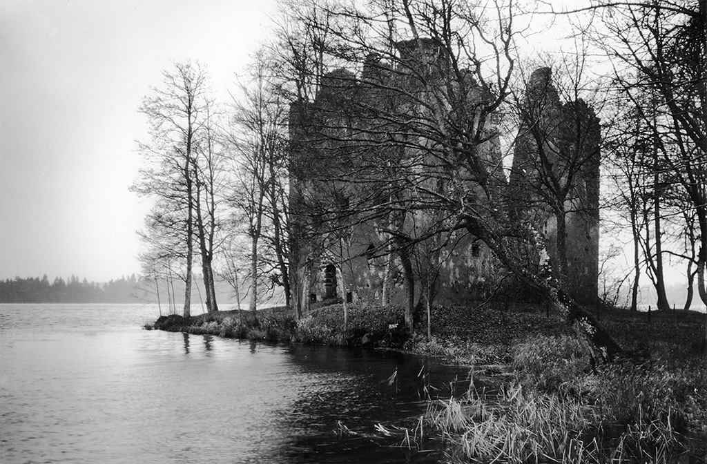 Bergkvara medieval castle ruin. Bergkvara medeltida slottsruin. Parish (socken): Bergunda Province (landskap): Småland Municipality (kommun): Växjö County (län): Kronoberg Photograph by: Mårten Sjöbeck Date: 1940 Format: Film Persistent URL: Read more about the photo database (in english)